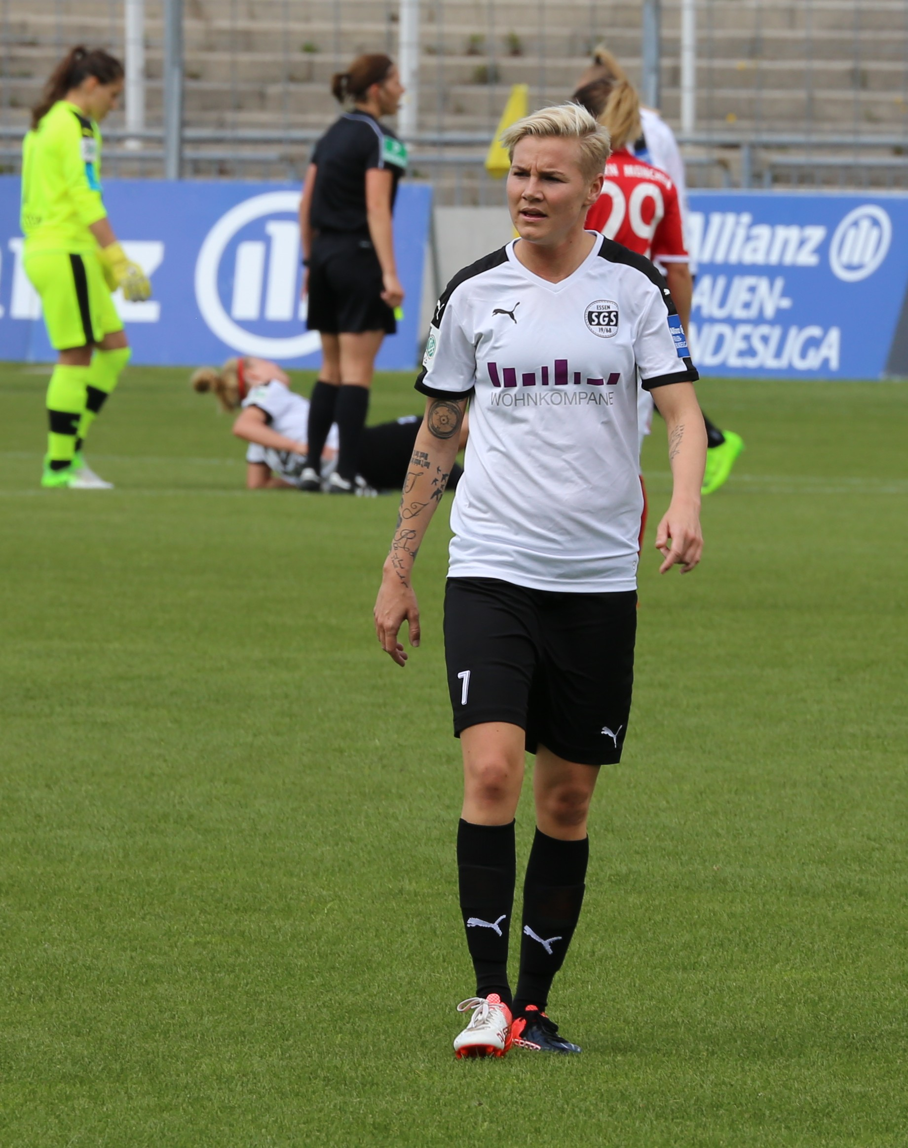 Sarah Freutel (SGS Essen) beim Frauen-Bundesliga-Spiel FC Bayern München gegen SGS Essen am 21. Mai 2017 im Stadion an der Grünwalder Straße (Ergebnis war 2:0)